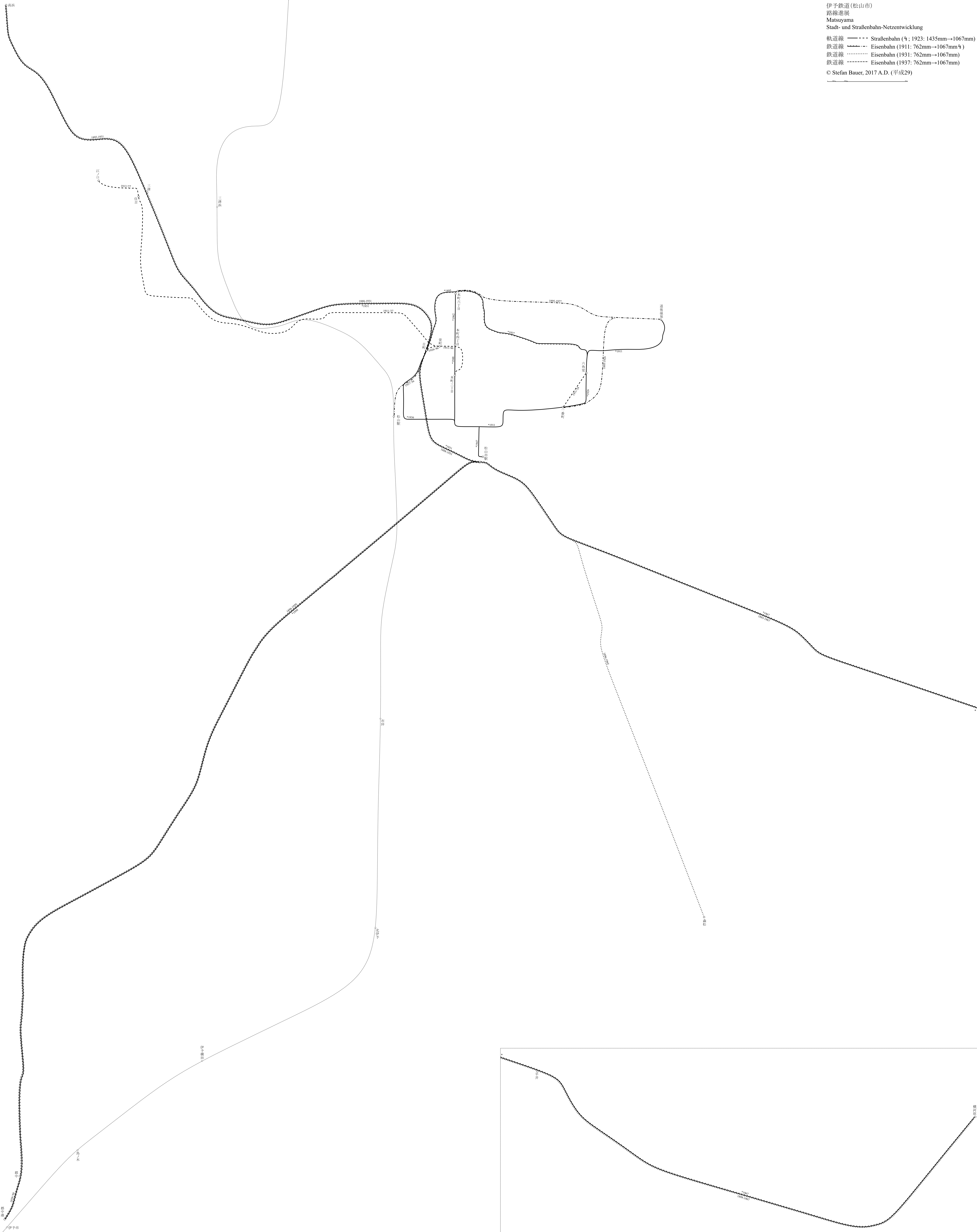 (伊予鉄道の路線進展図